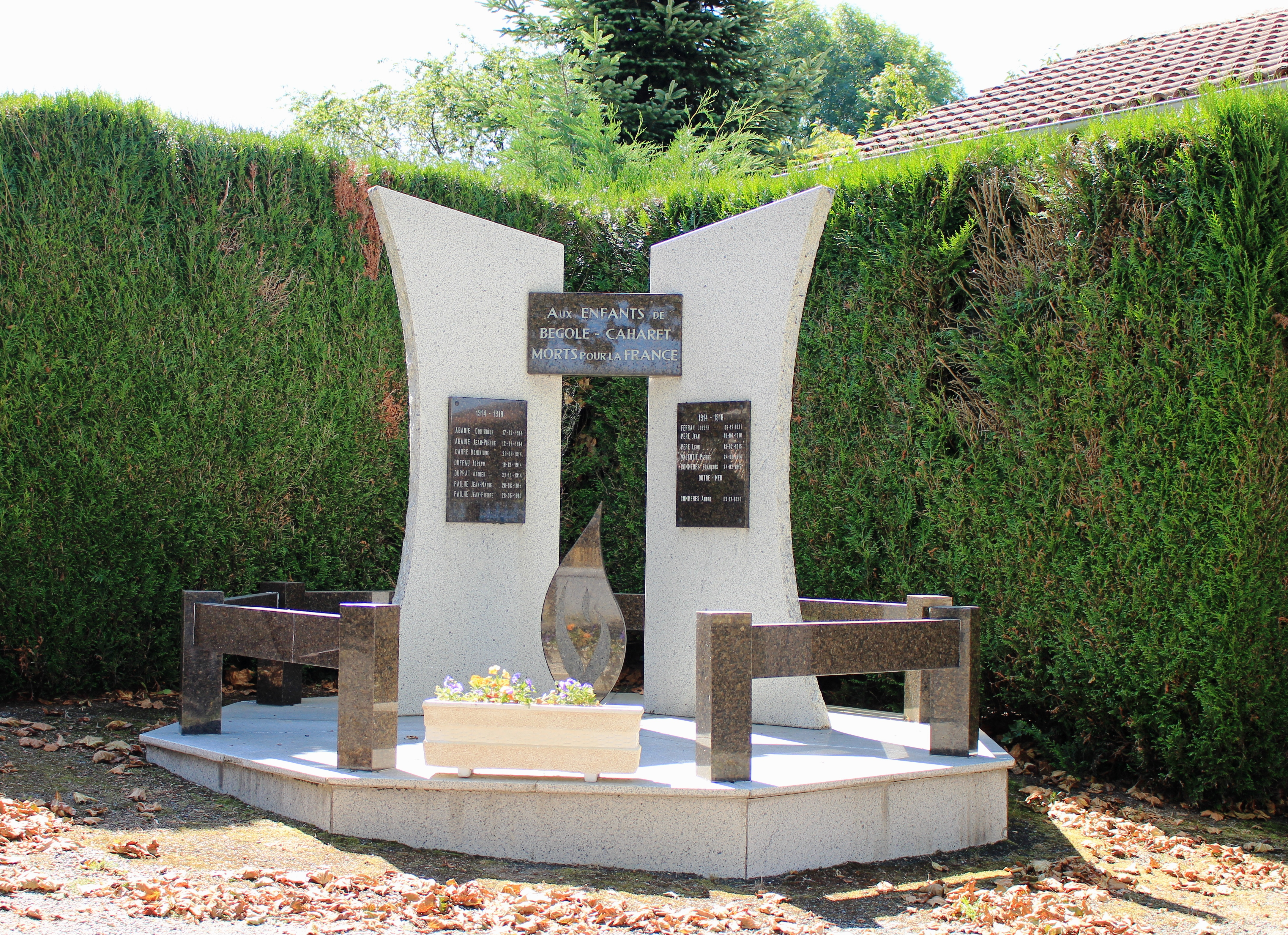 Monument aux morts de Bégole (Hautes-Pyrénées)